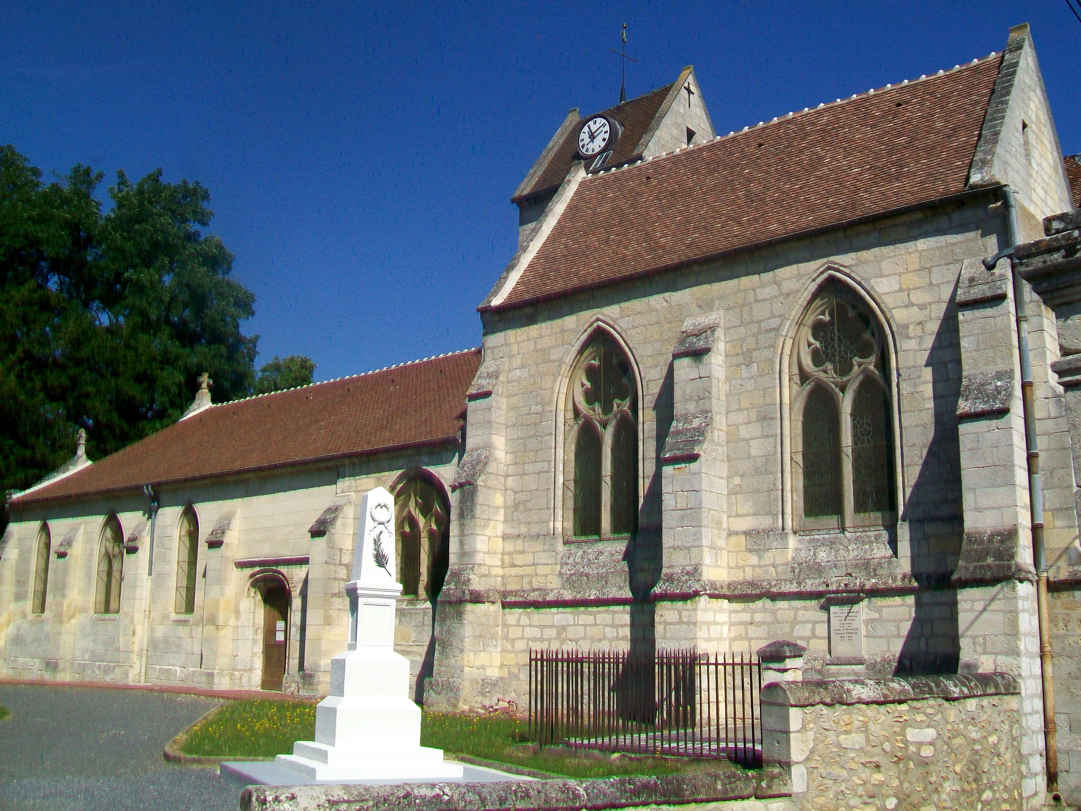 Vue d'ensemble de l'église depuis le sud.